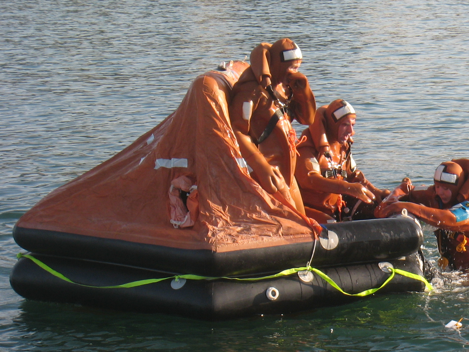 Embarquement naufragés dans radeau